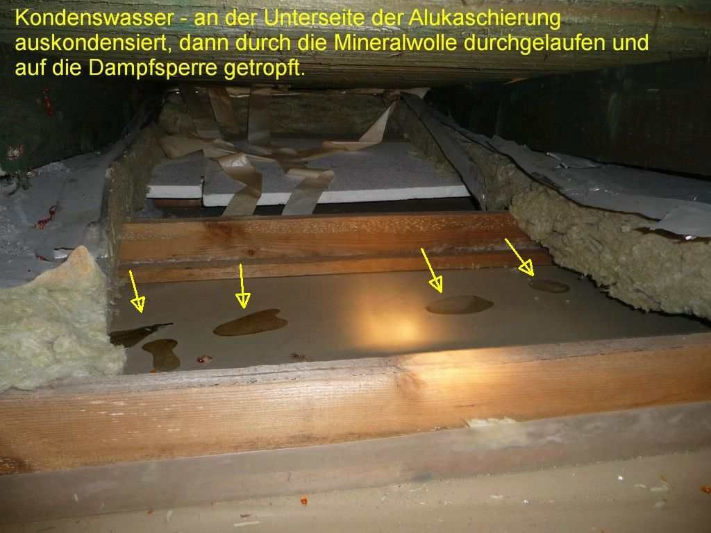 Kondenswasserpfützen auf einer Dampfsperrfolie in einem Flachdach Die Folge, wenn ein Flachdach innen und außen dampfdicht gebaut wird: kleinste Mengen unplanmäßig eindringender Feuchte können nicht ausdiffundieren und sammeln sich in Kondenswasserpfützen auf der Dampfsperre. Dass die Mineralwollbahnen falsch herum verlegt wurden (die Alukaschierung gehört nach unten), ist hier nicht schadensursächlich. Flachdächer müssen vorzugsweise hohlraumfrei mit sorptiven (saugfähigen) Dämmstoffen verfüllt werden und benötigen an der Warmseite eine feuchtevariable Dampfbremsfolie, aber keine Dampfsperre. Ist die Höhe für eine hohlraumfreie Verfüllung zu hoch, kann notfalls gut und reichlich überlüftet werden.